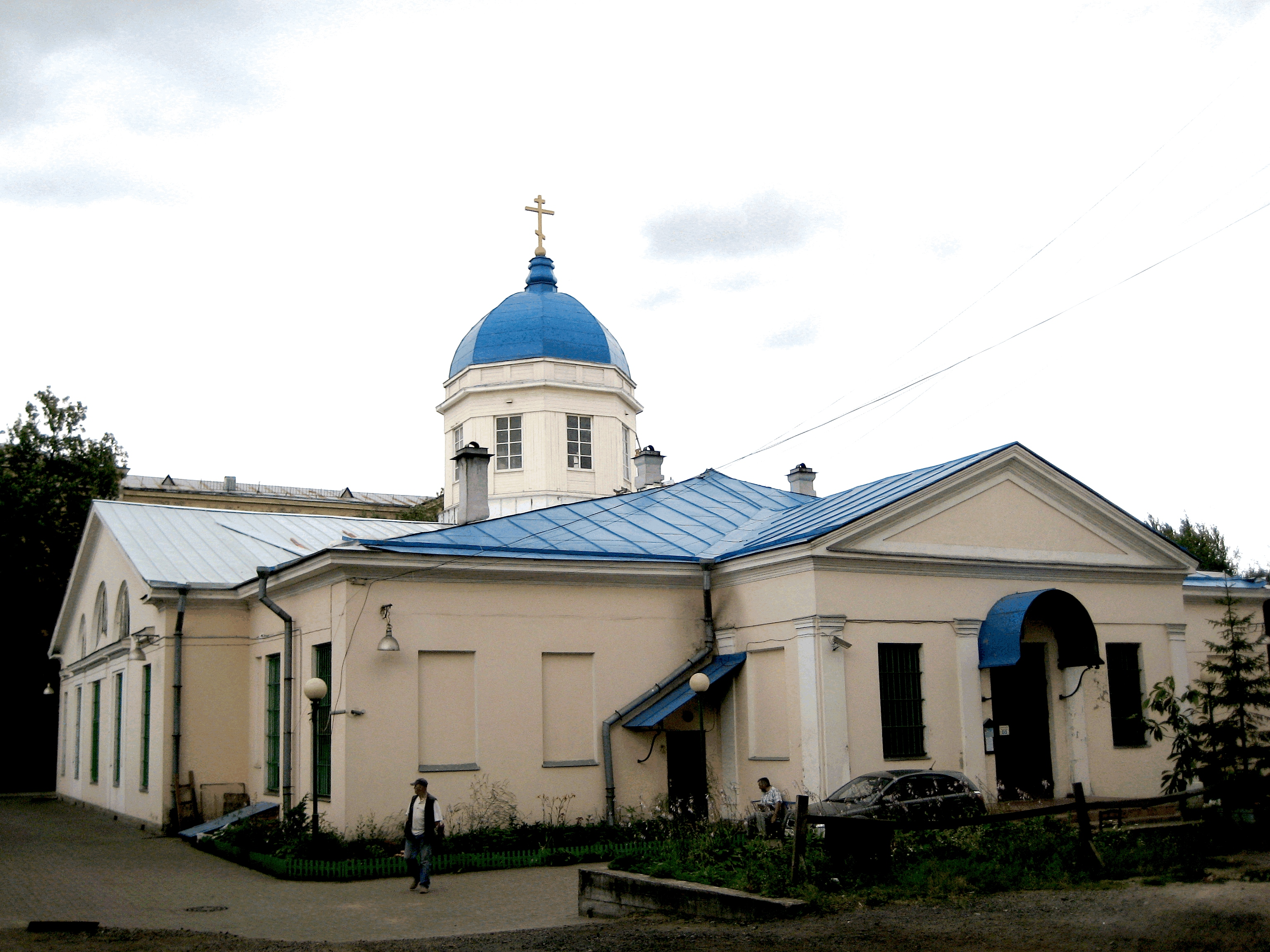 Тихвинская церковь (Санкт-Петербург, Лиговский проспект, 128)